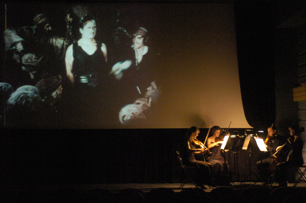 Le Quatuor Prima Vista accompagne "Le Pirate Noir" en ciné-concert.